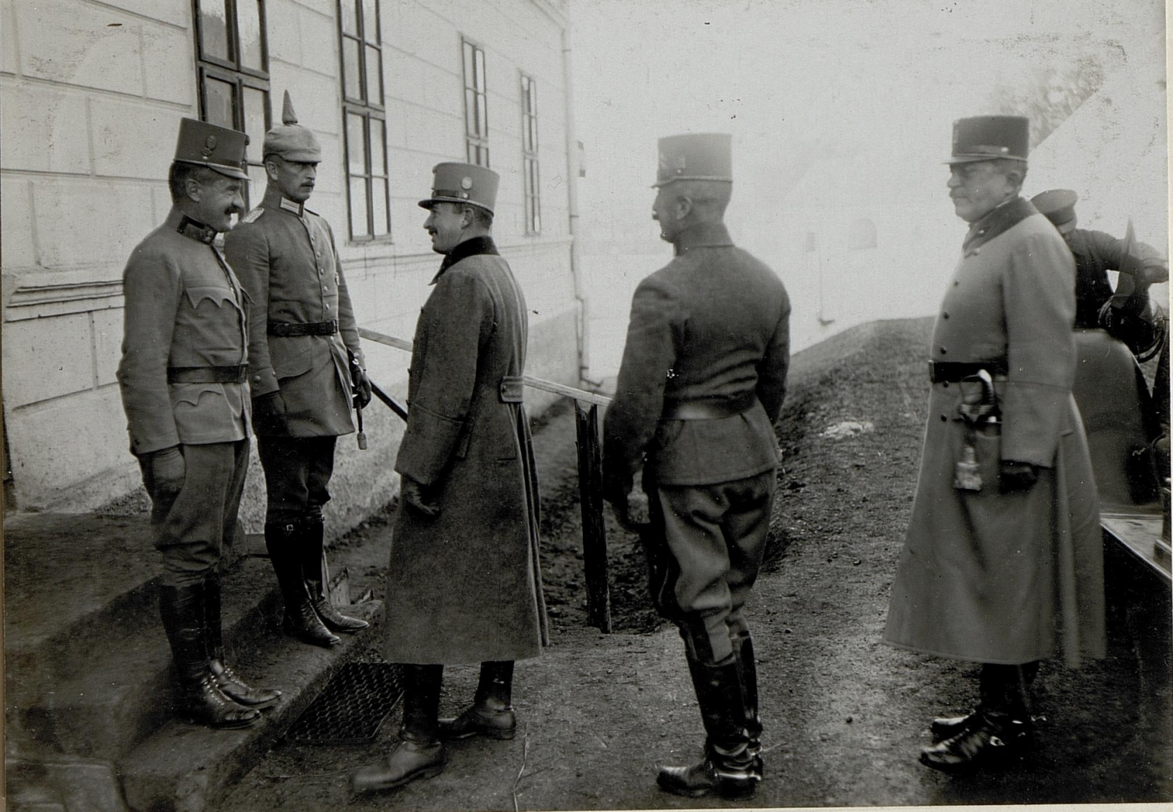 Erzherzog Karl war von Juni 1916 an, Oberkommandierender eines Teilabschnittes der Ostfront und befehligte mehrere Armeen zwischen Brody und den Karpaten. Im Rahmen dieses Kommandos inspizierte Erzherzog Karl seine ihm zugeordneten Einheiten.